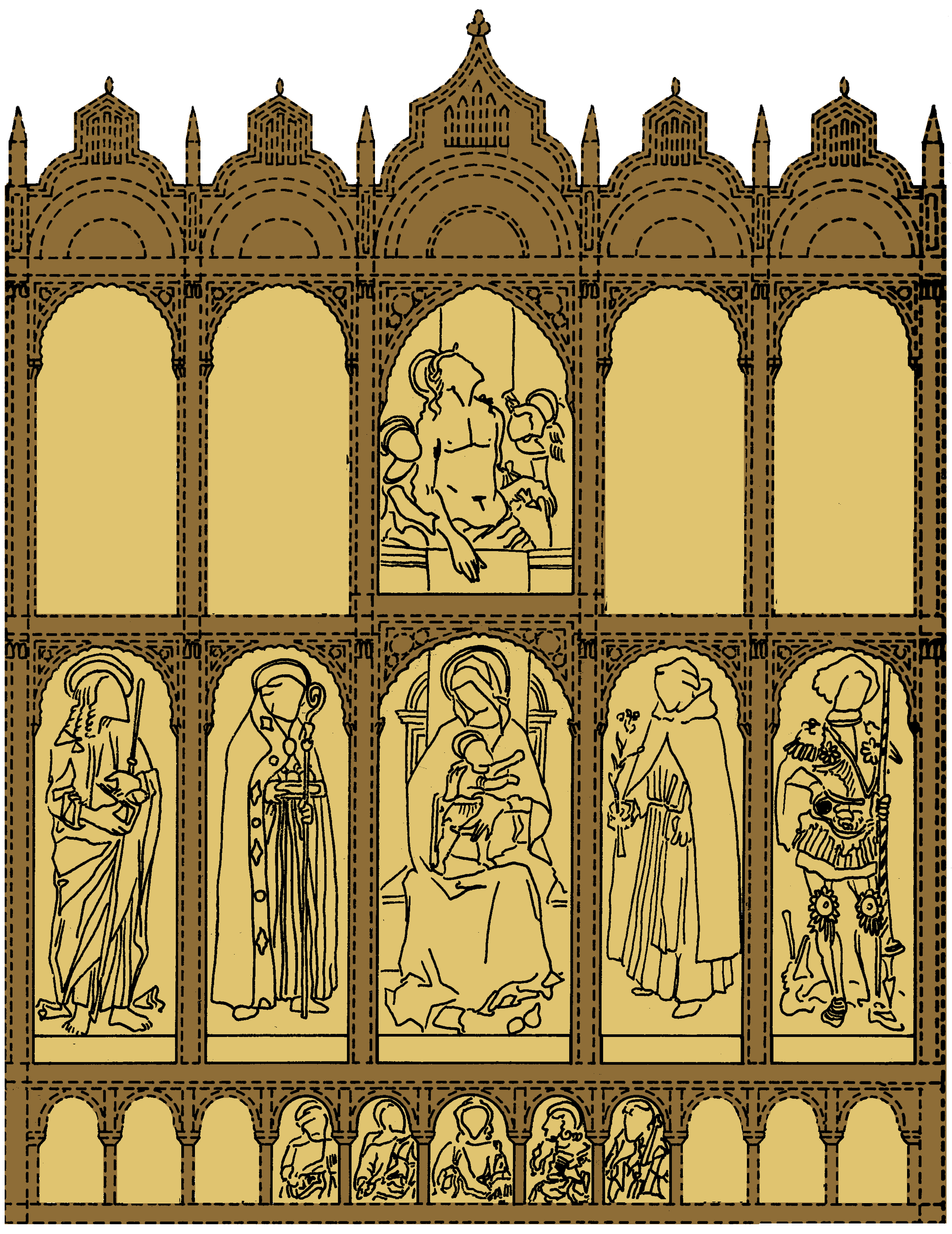 Carlo crivelli, polittico del 1472